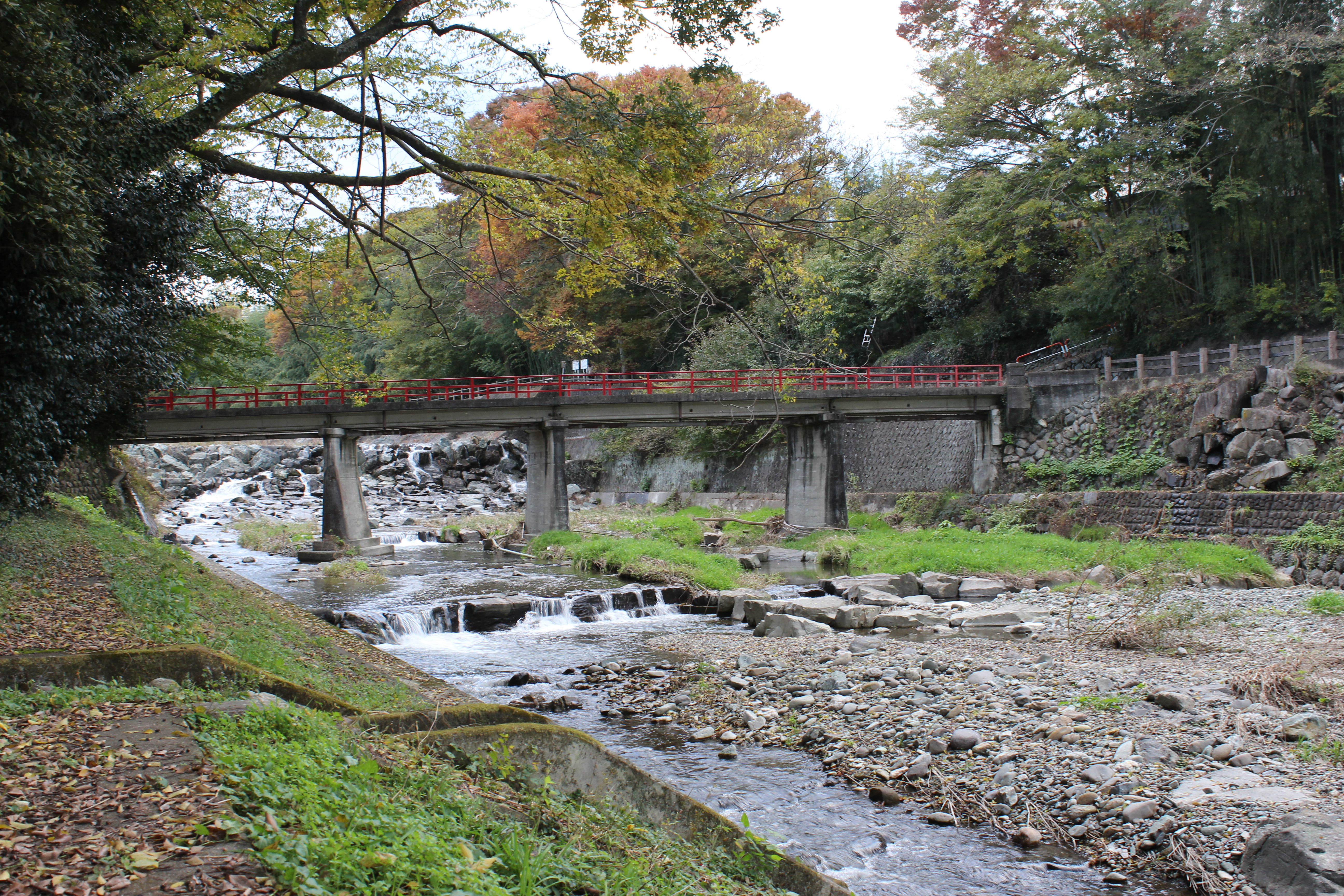 利根川水系 雄川。「せせらぎの路」にて上流方向。裏門橋を望む（群馬県甘楽郡甘楽町大字小幡）。